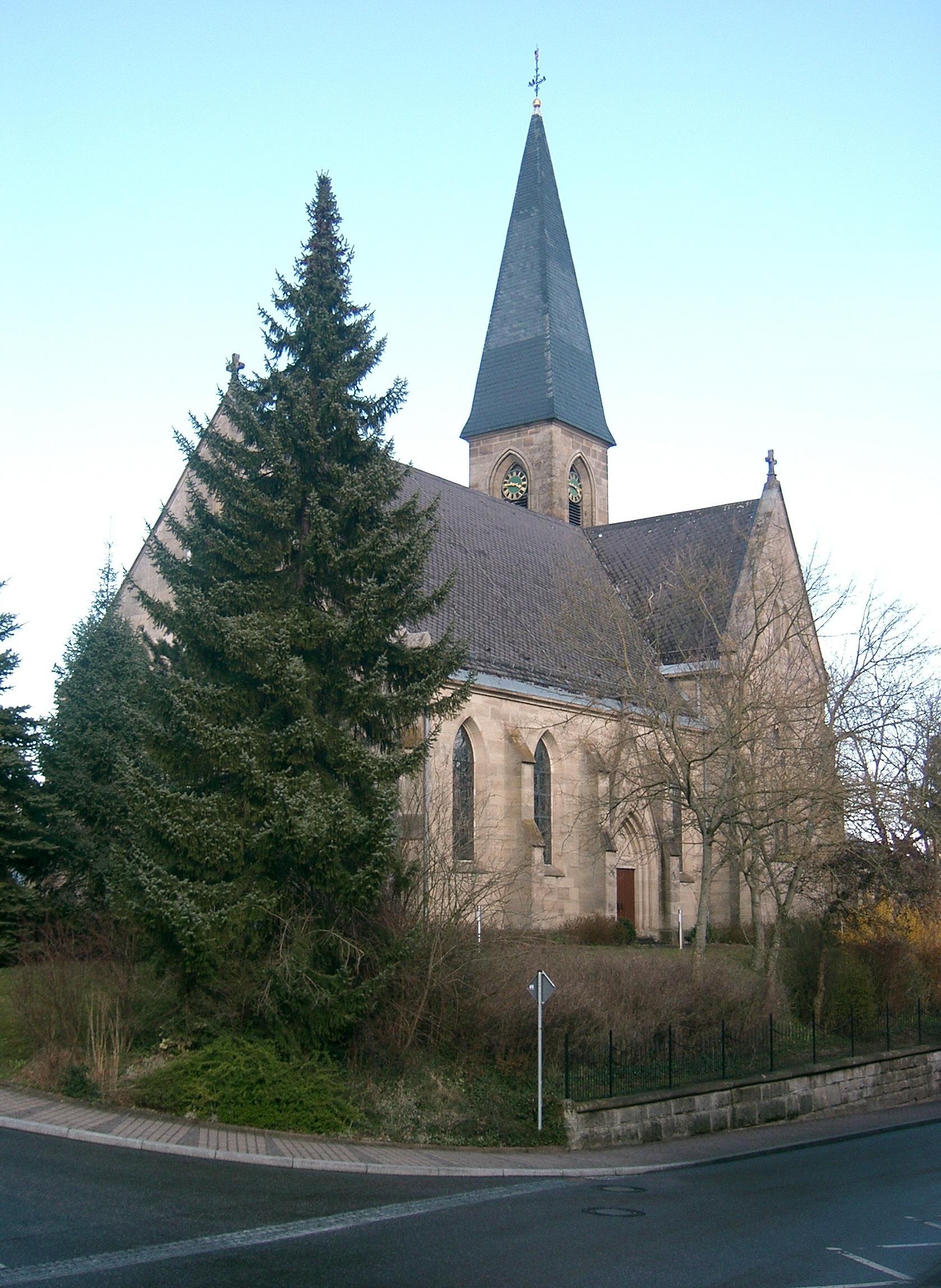 Die katholische Kirche Peter und Paul in Pfedelbach